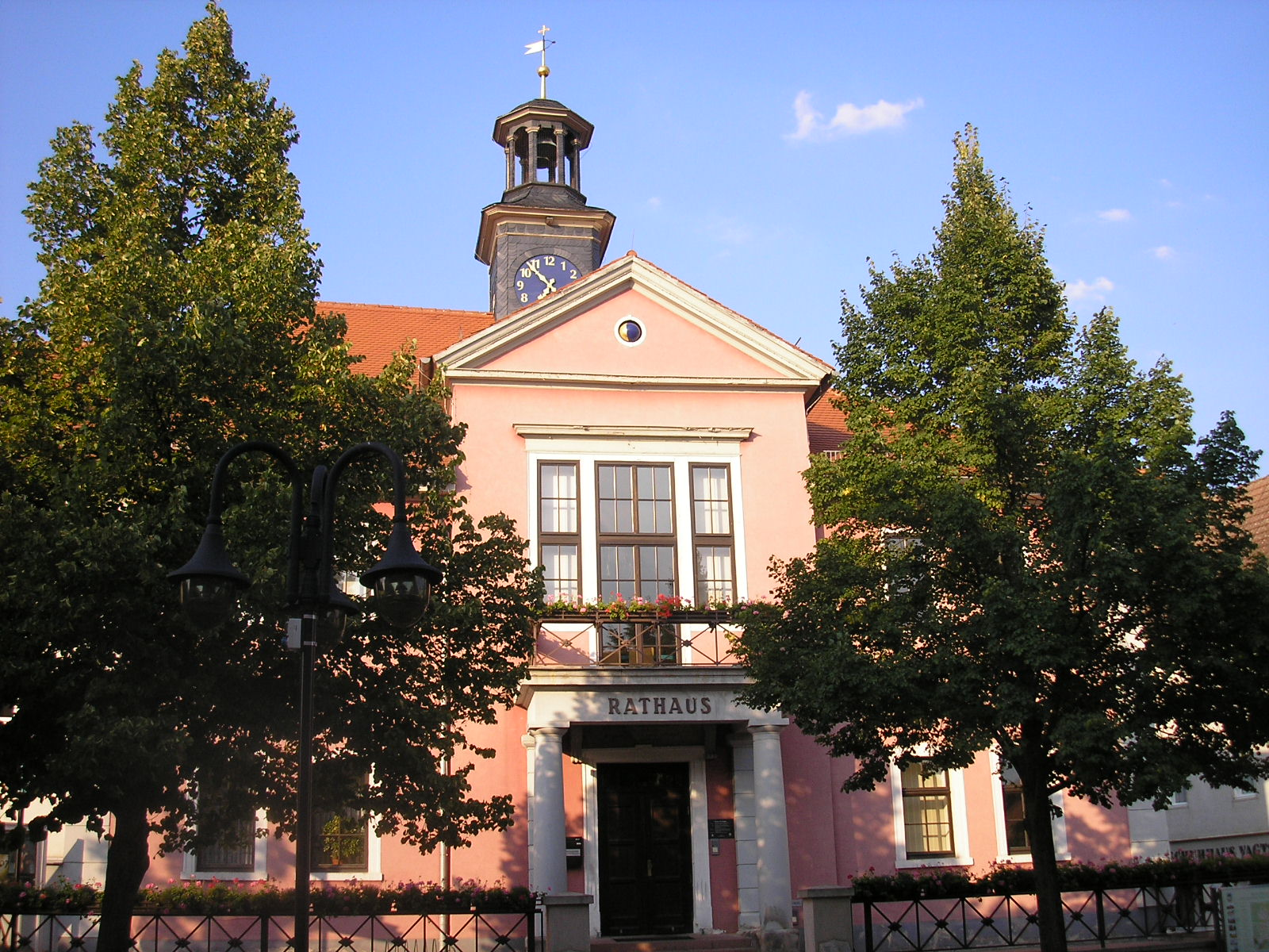 Das Rathaus von Bad Berka (Thüringen).